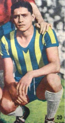 Lidoro Soria